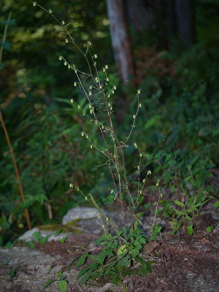 Carpesium rosulatum：ヒメガンクビソウ 2014/09/27 和歌山県田辺市：Tanabe City. Wakayama Pref. Japan